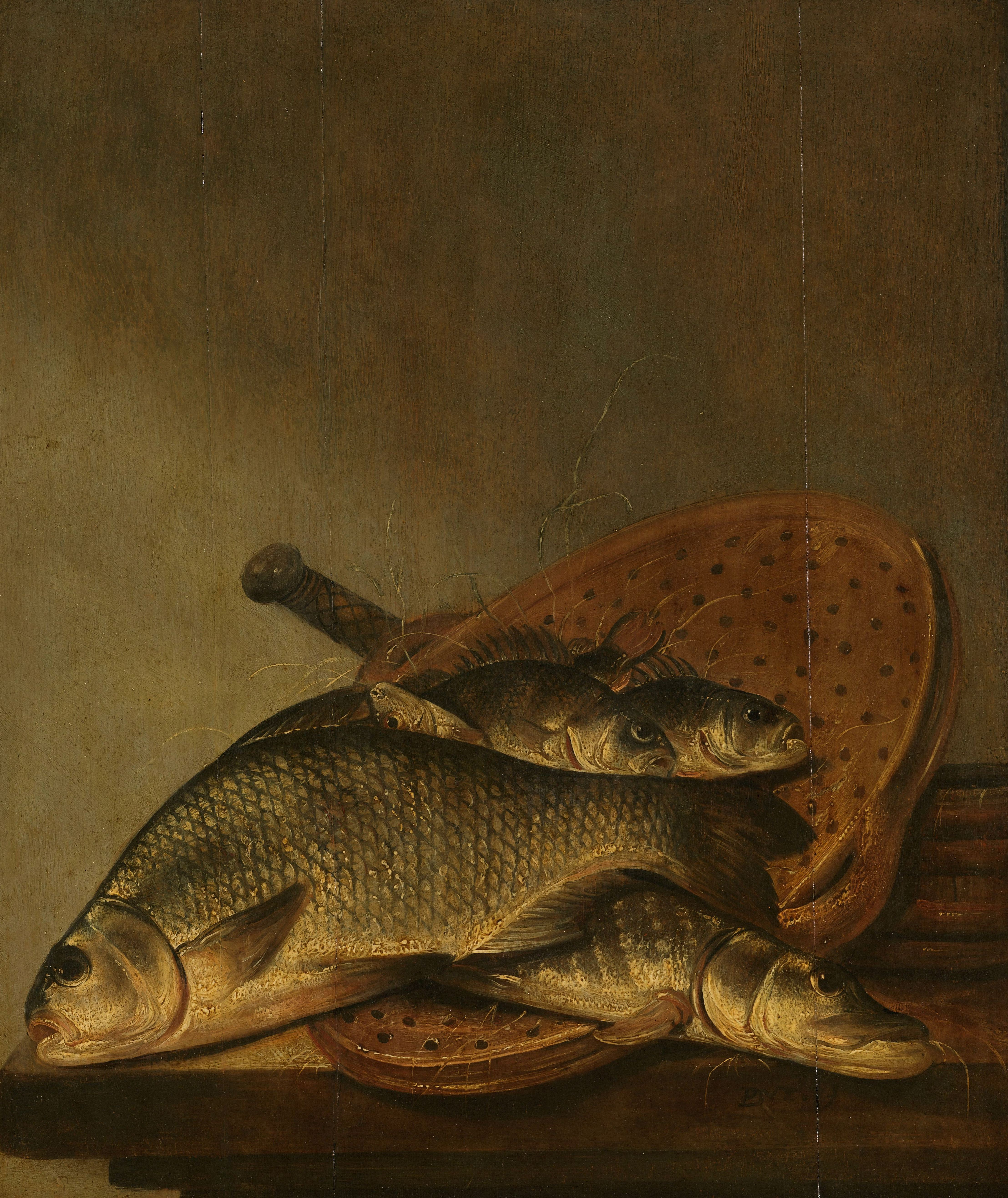 Visstilleven. Op de hoek van een houten tafel liggen enkele verschillende soorten vissen op een aardewerken vergiet.